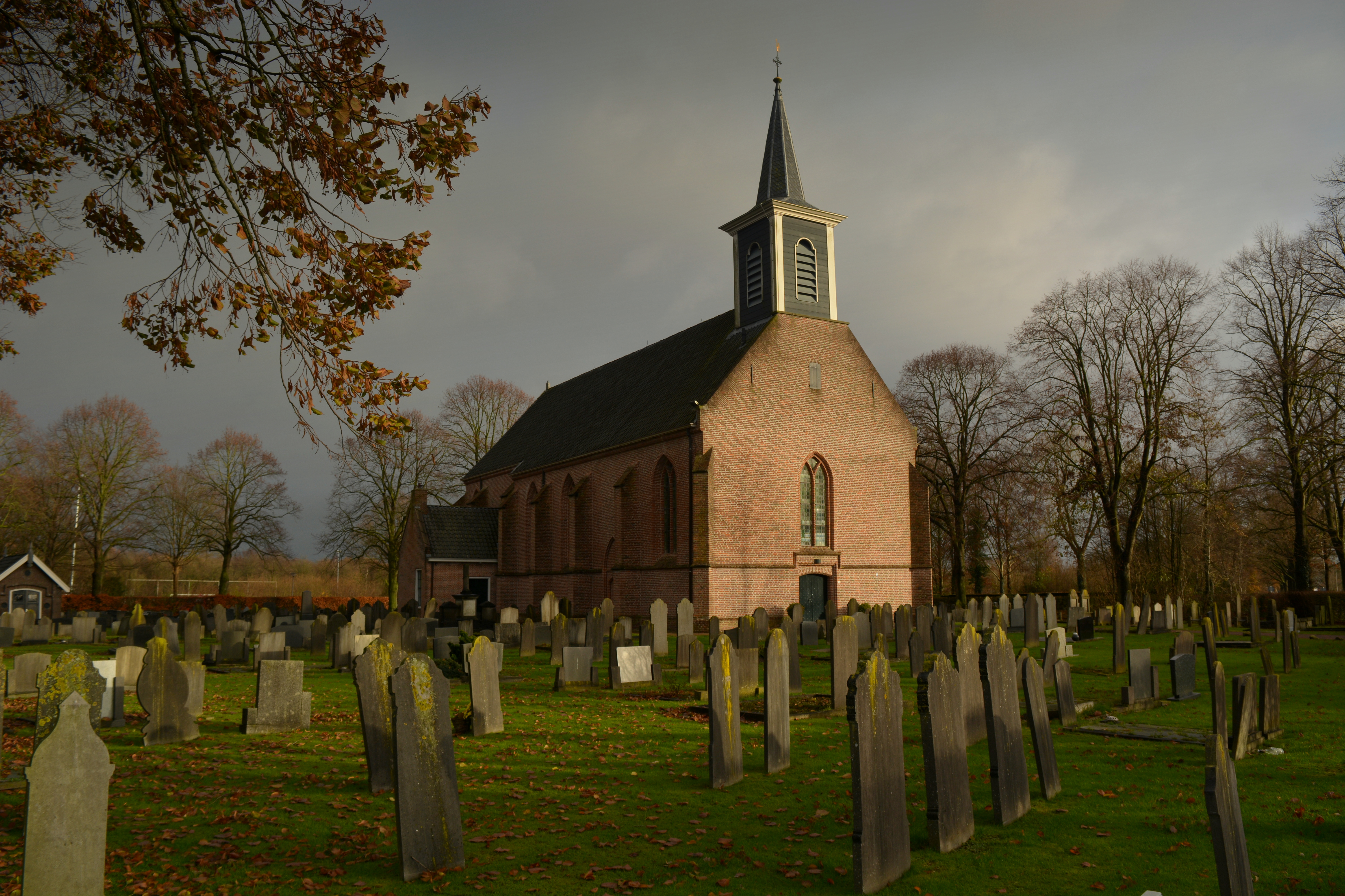 Protestanske tsjerke fan Stienwikerwâld